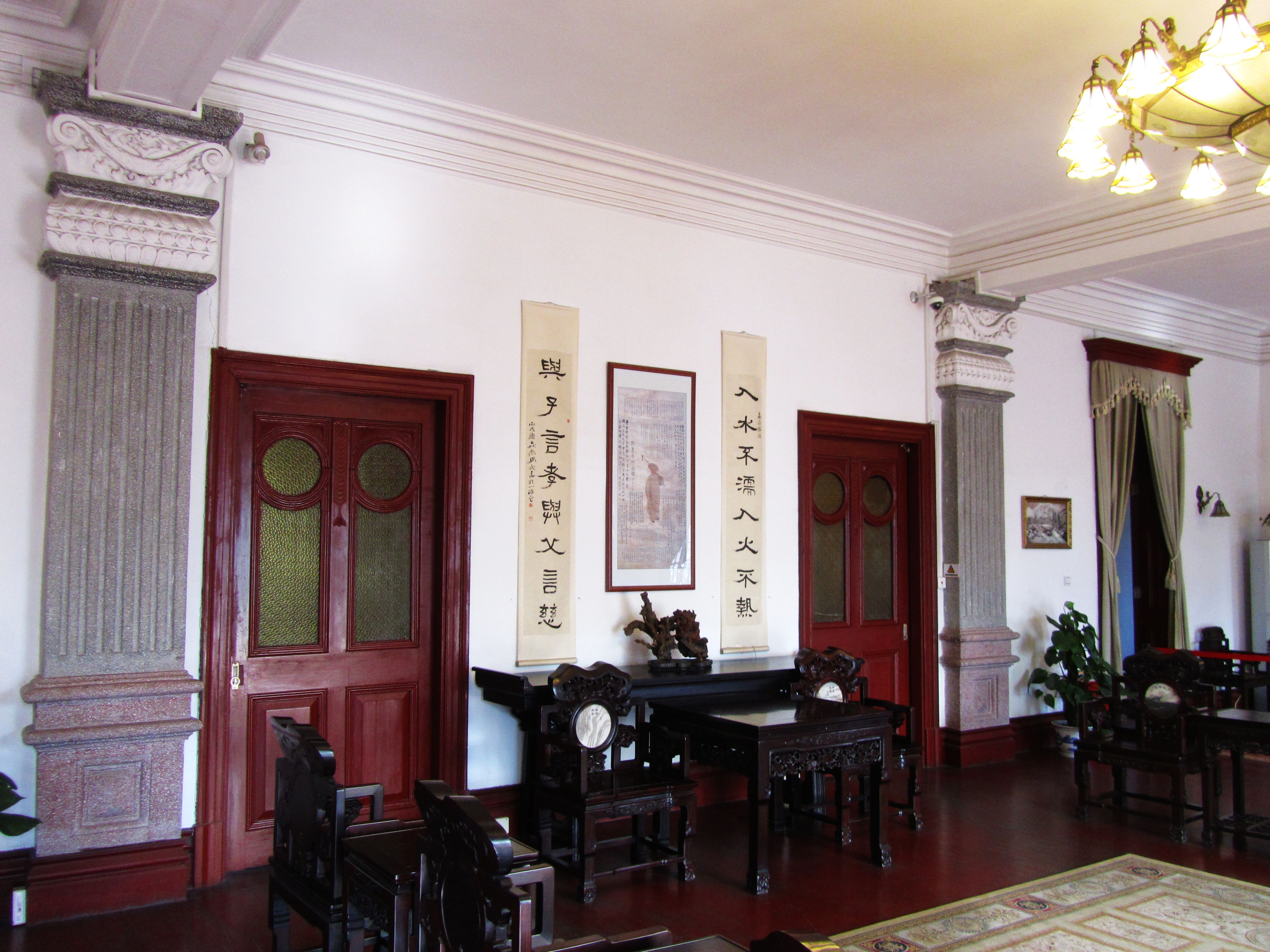 张謇濠南别业东楼，一楼内景。